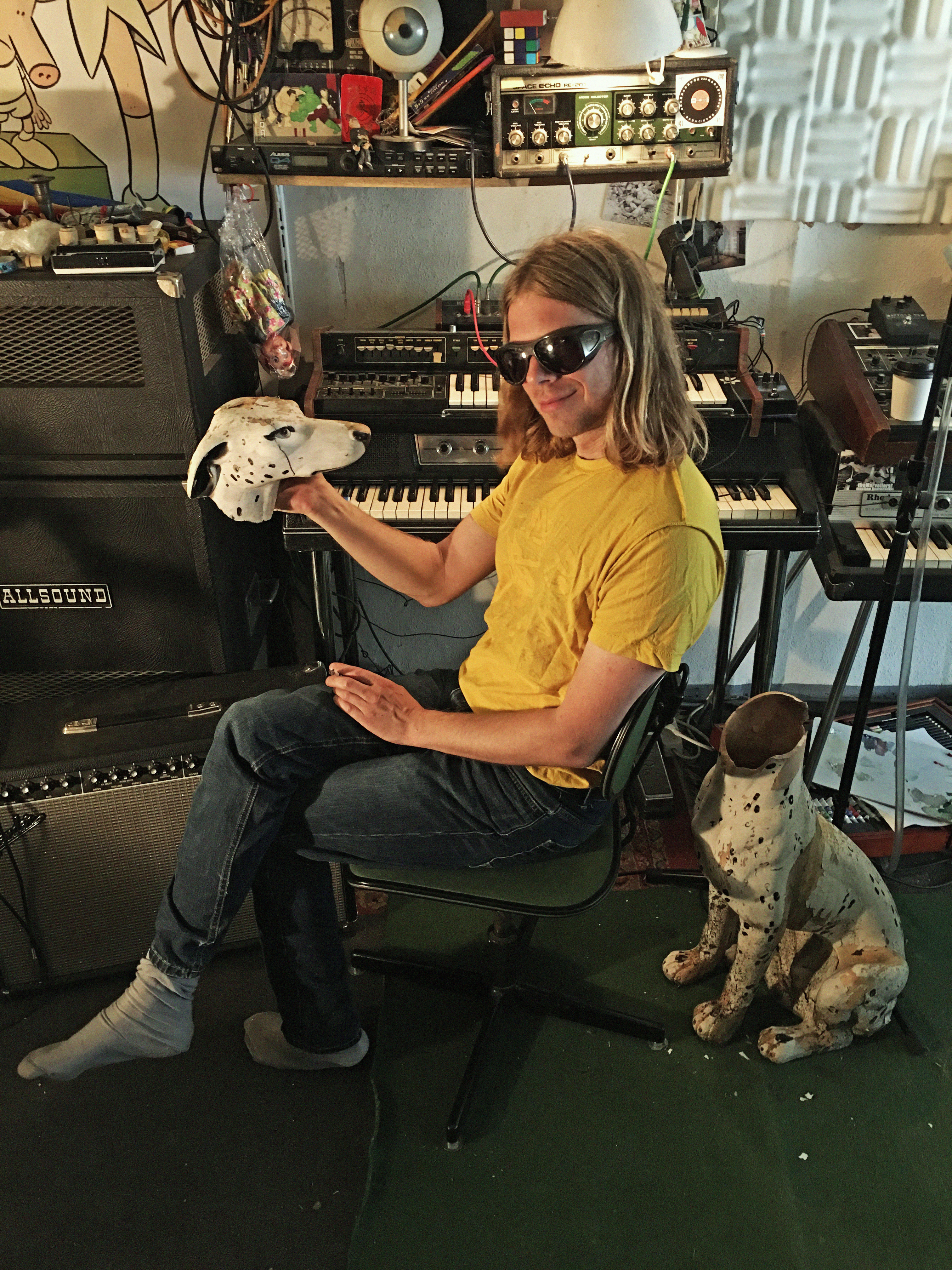 Siriusmo in seinem natürlichen Umfeld.